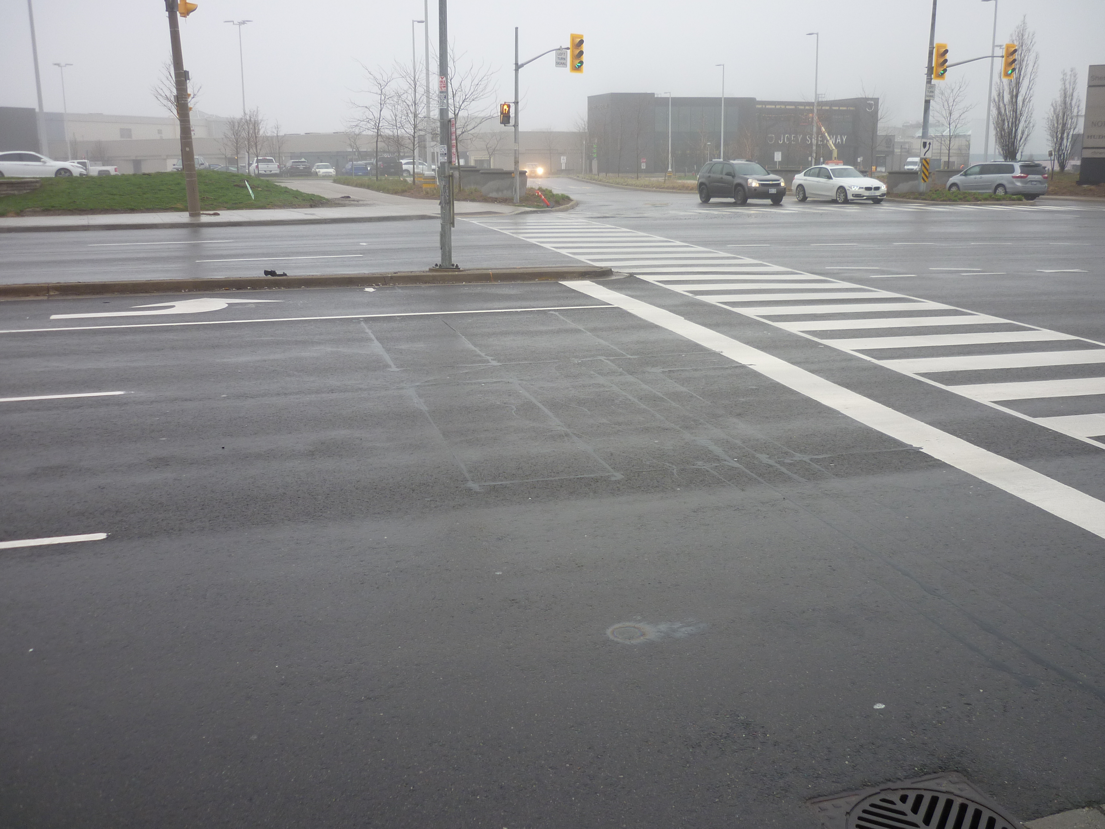 Індуктивна петля у покритті дороги. Призначена для подання сигналу про проїзд транспортного засобу на заборонений сигнал світлофора.